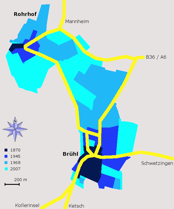 Entwicklung der Bebauung Brühl